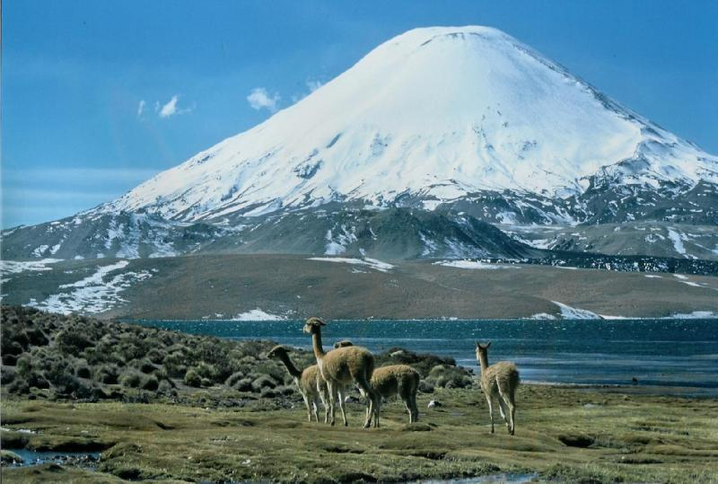 Description : Le lac Chungará est dominé par le volcan Parinacota, qui culmine à 6 320 mètres. Source : Photo de Michel Lagarde trouvé sur Licence : "Nous souhaitons mettre ici à la disposition des collègues d'Espagnol des images libres de droits."